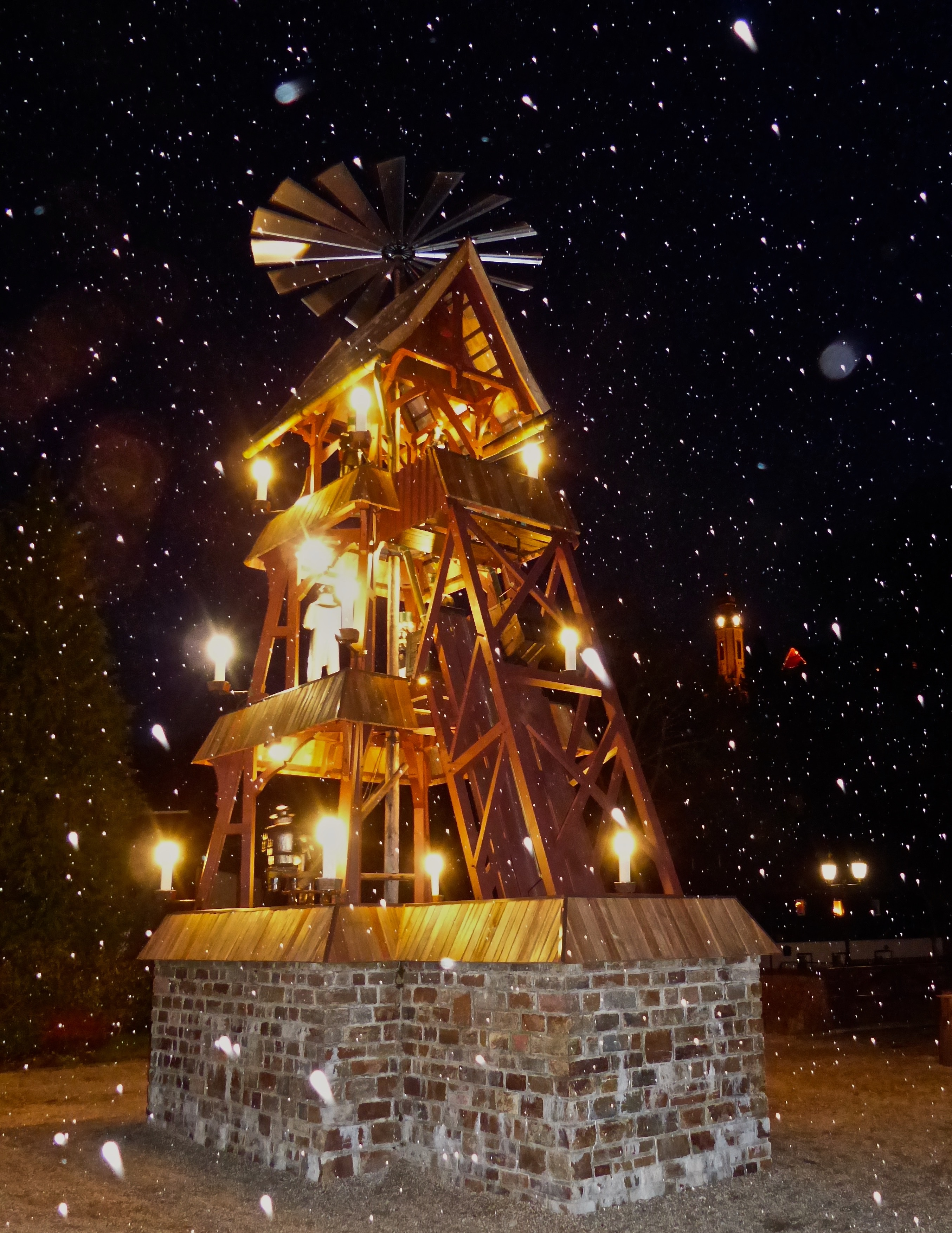 Göpelpyramide in Pobershau bei Schneefall